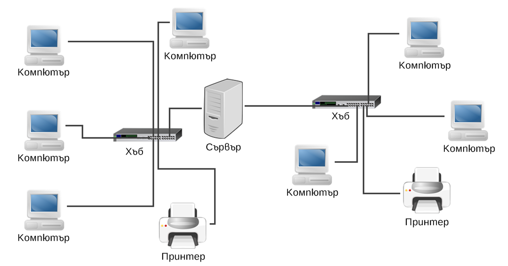 Компютърна мрежа